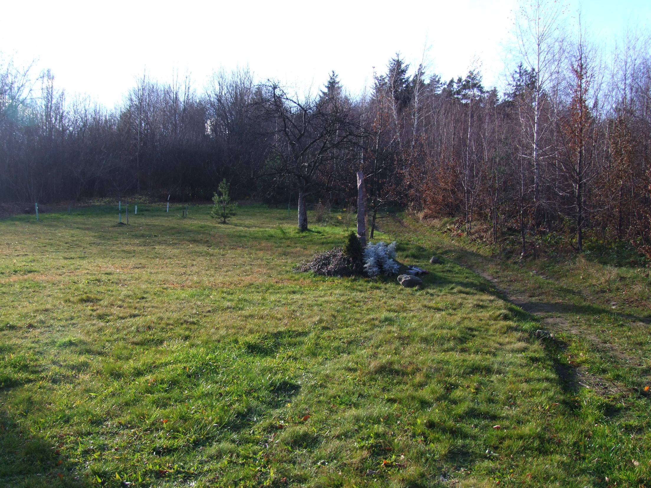 Polana Mulowiec pod szczytem Kobyły w Beskidzie Wyspowym